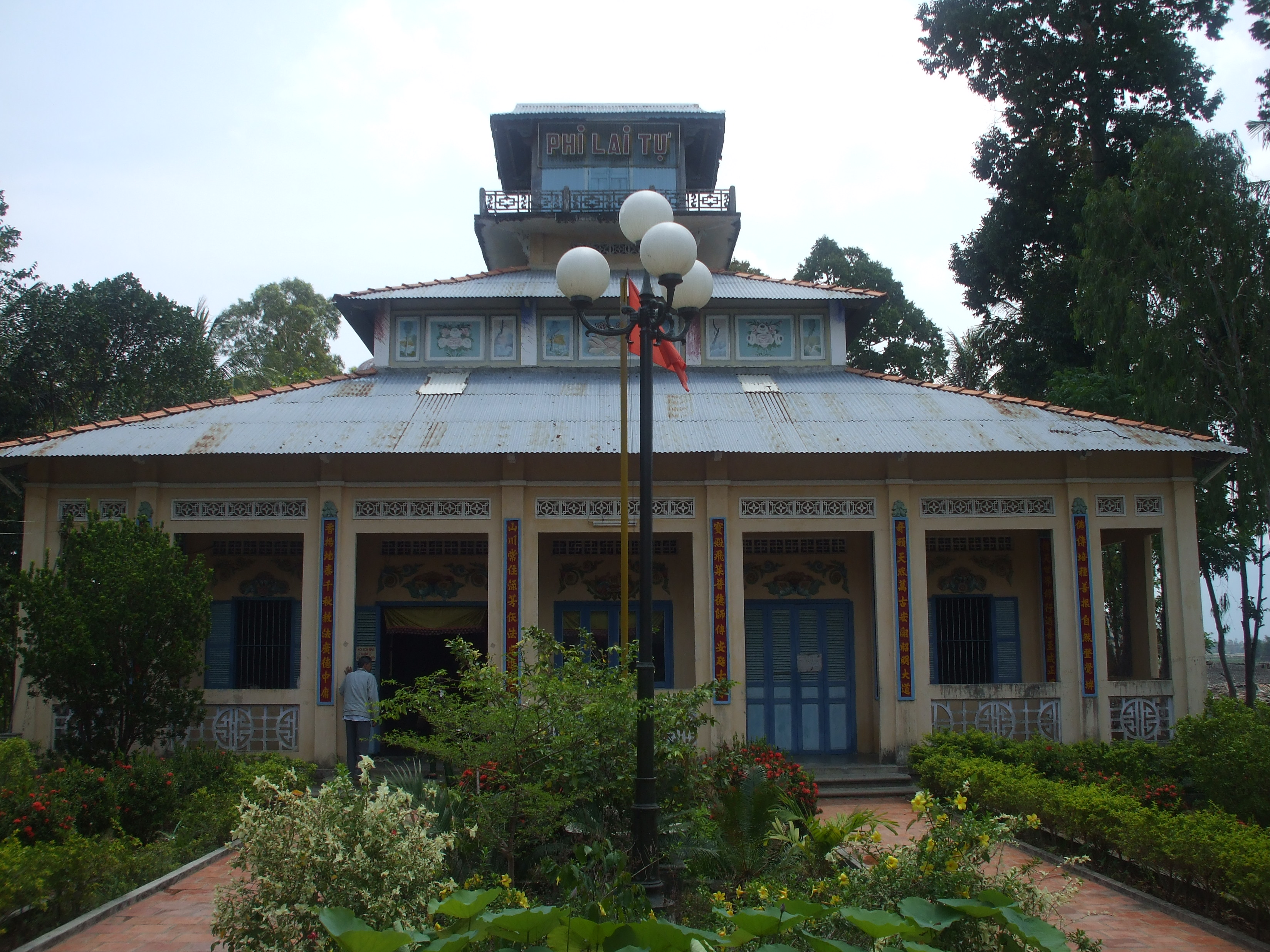 Chùa Phi Lai do Ngô Lợi cho xây dựng, hiện ở Ba Chúc, huyện Tịnh Biên, tỉnh An Giang.